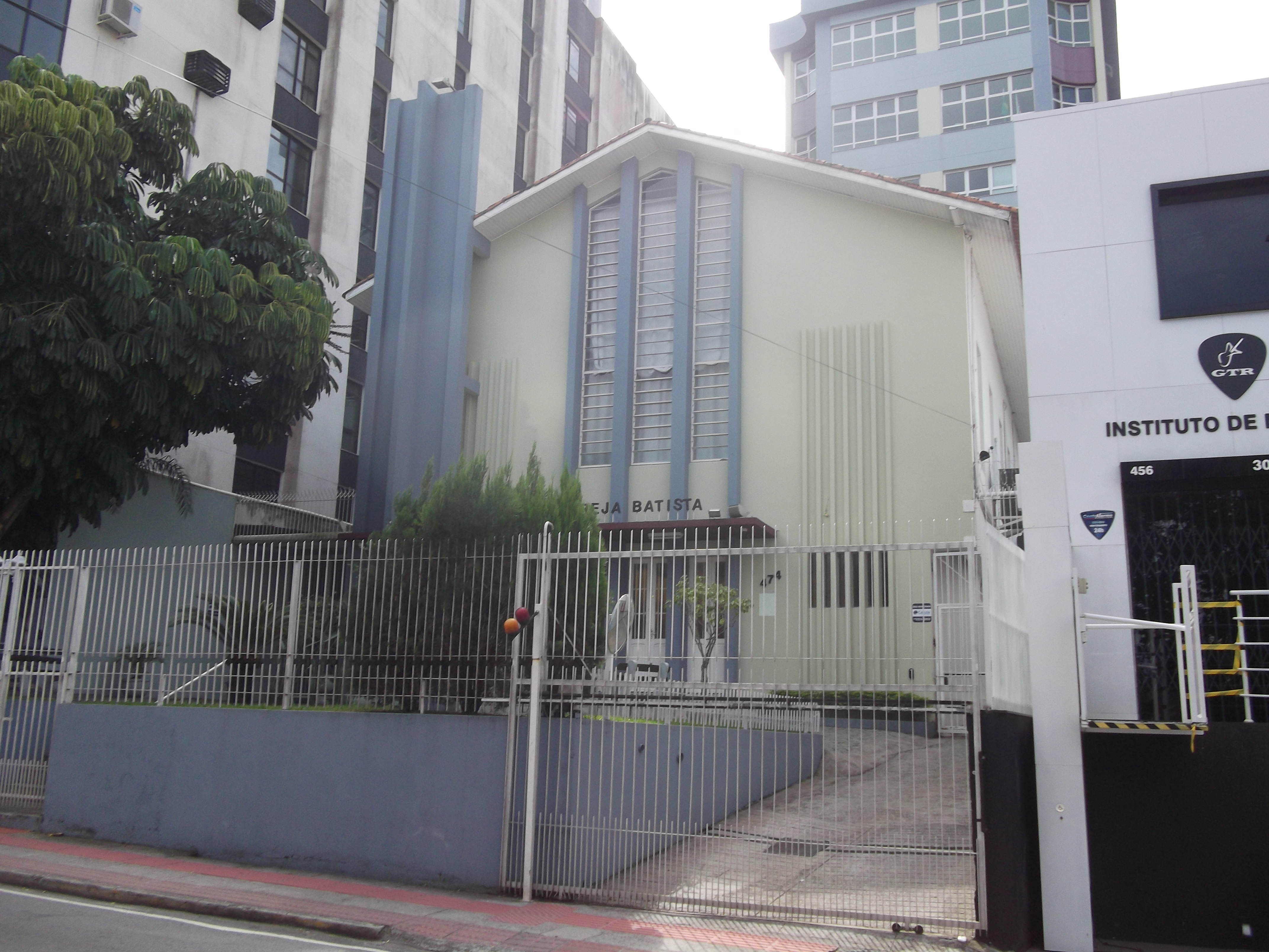 Primeira Igreja Batista de Florianópolis